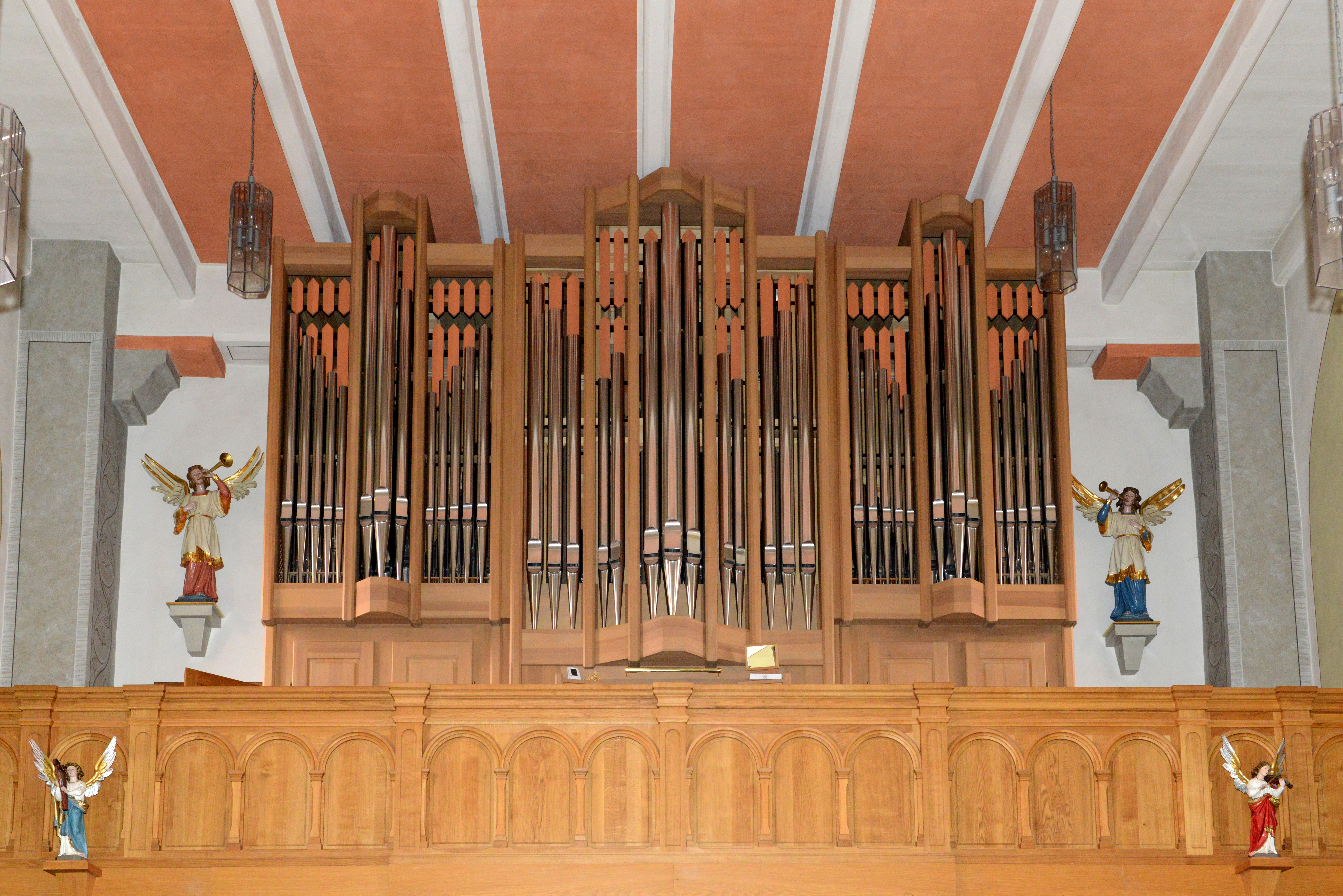 Déi nei (2009) Eisenbarth-Uergel an der Kierch zu Ierpeldeng op der Sauer.